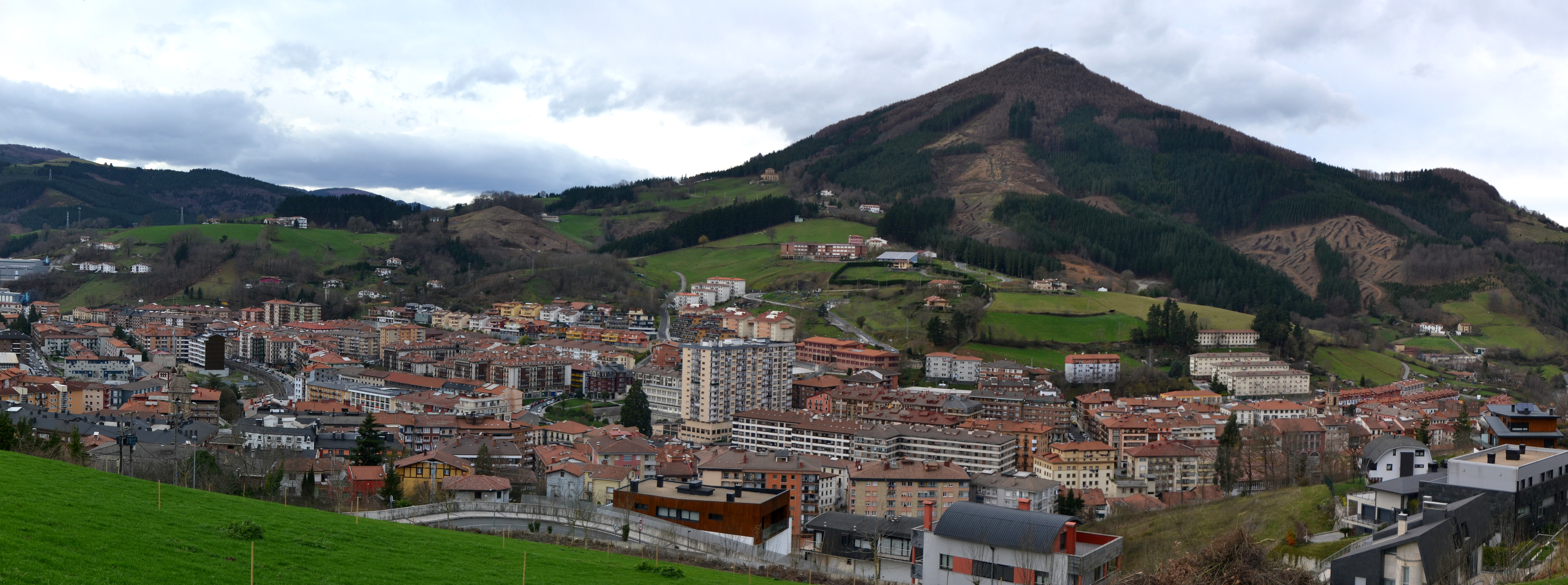 Zumarraga, Urretxu eta Irimo mendia. Gipuzkoa, Euskal Herria.